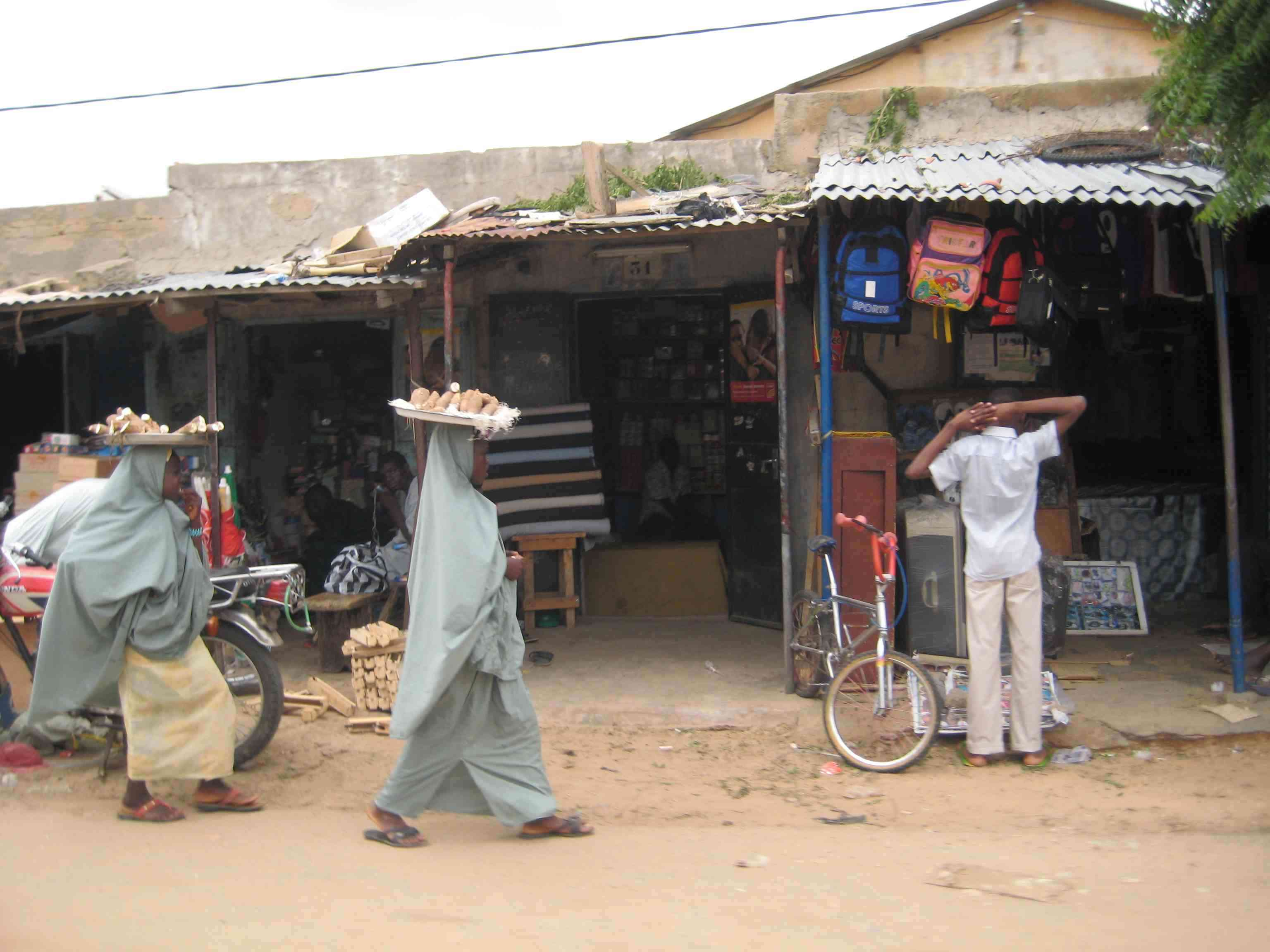 Market at Maradi, Niger August 5, 2007